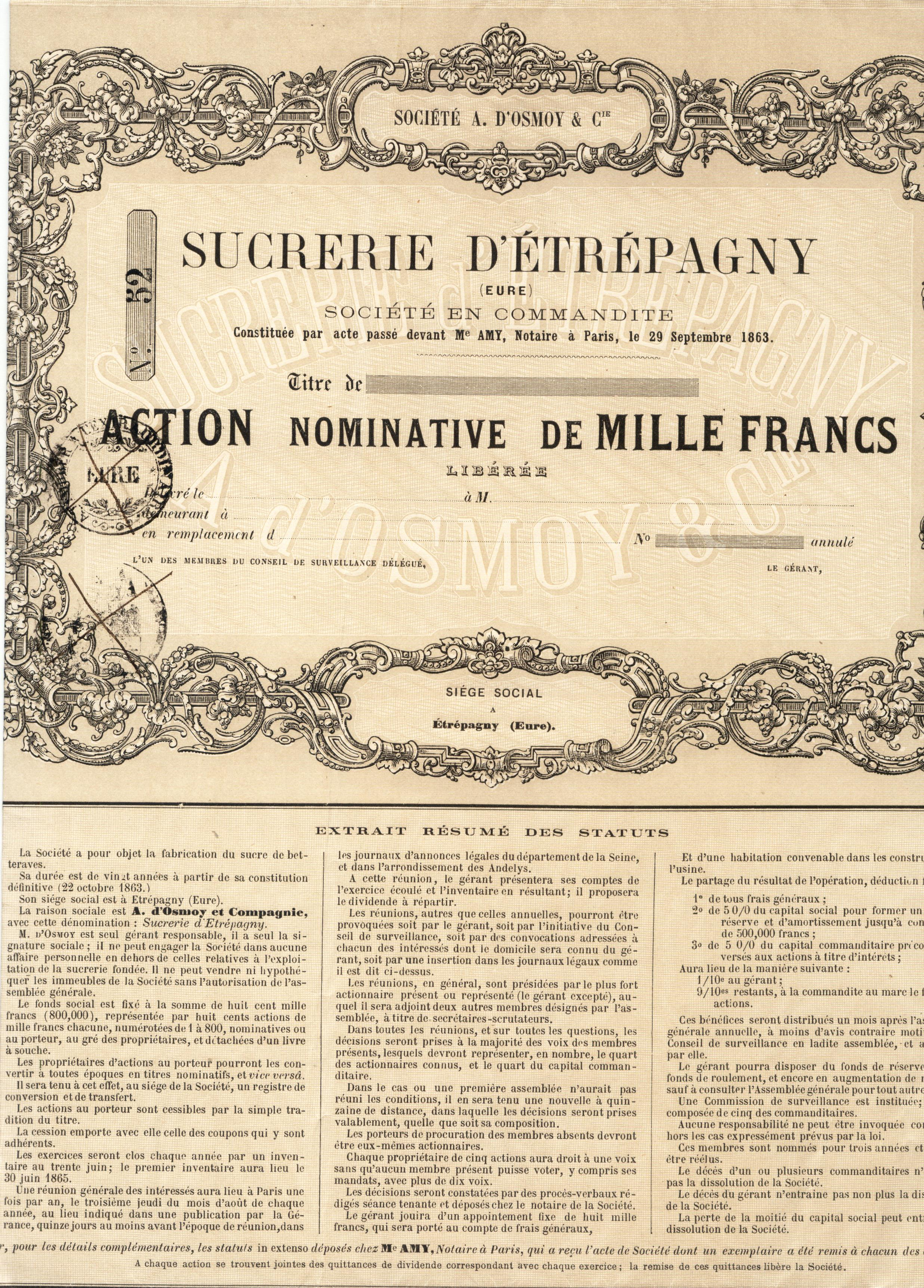 La 1ere Action de A.d'Osmoy & Cie.